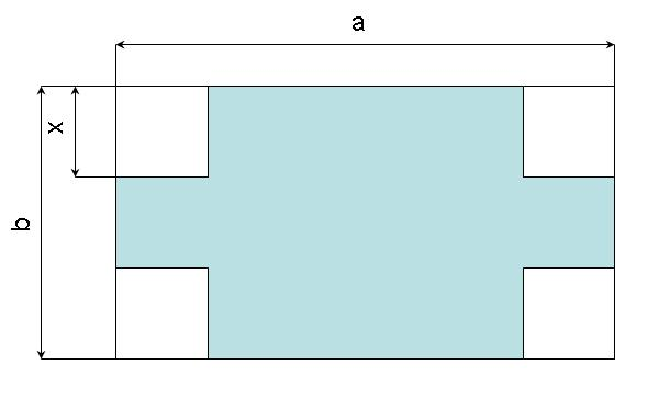 Flan d'une boîte